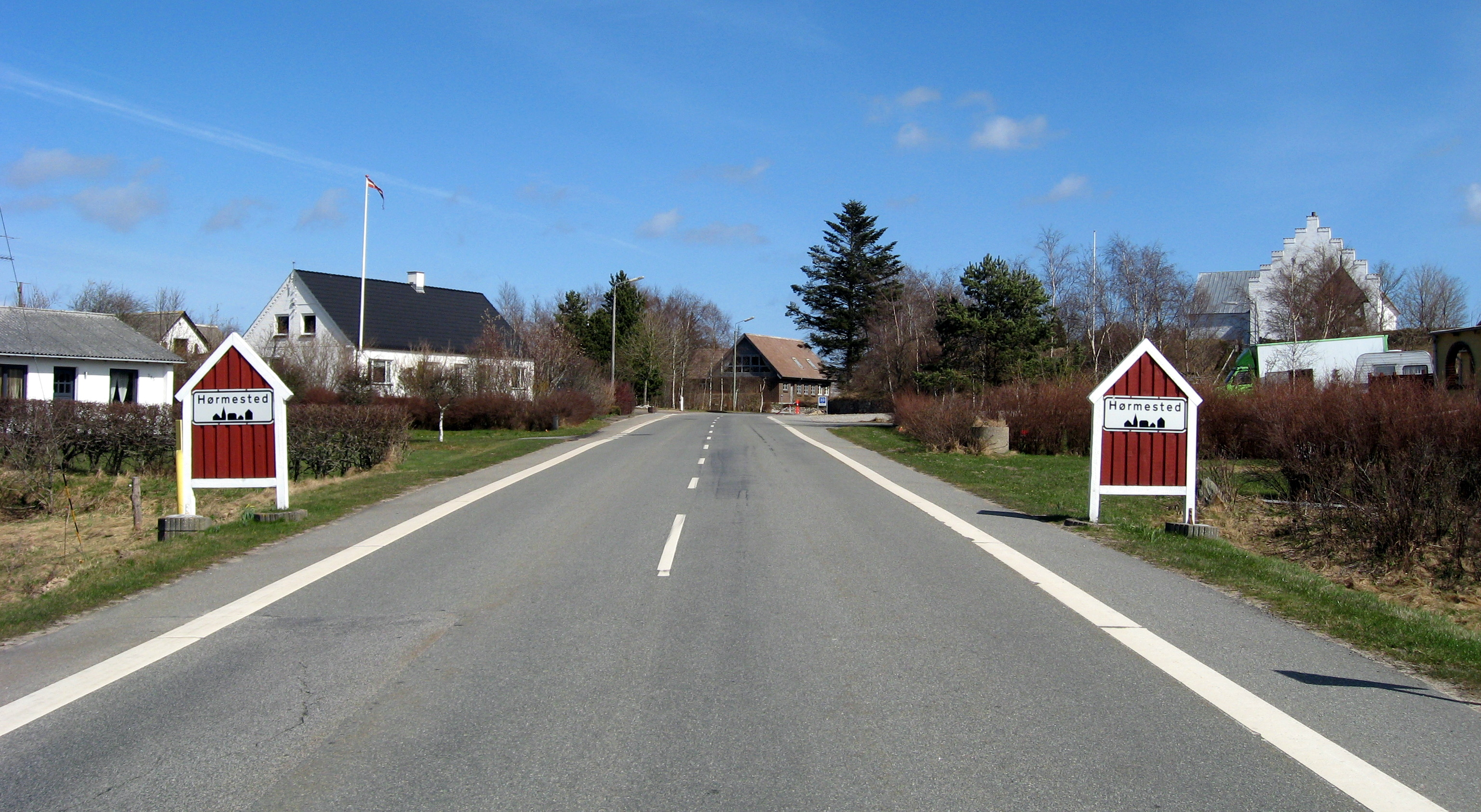 Hørmested, Hjørring Kommune